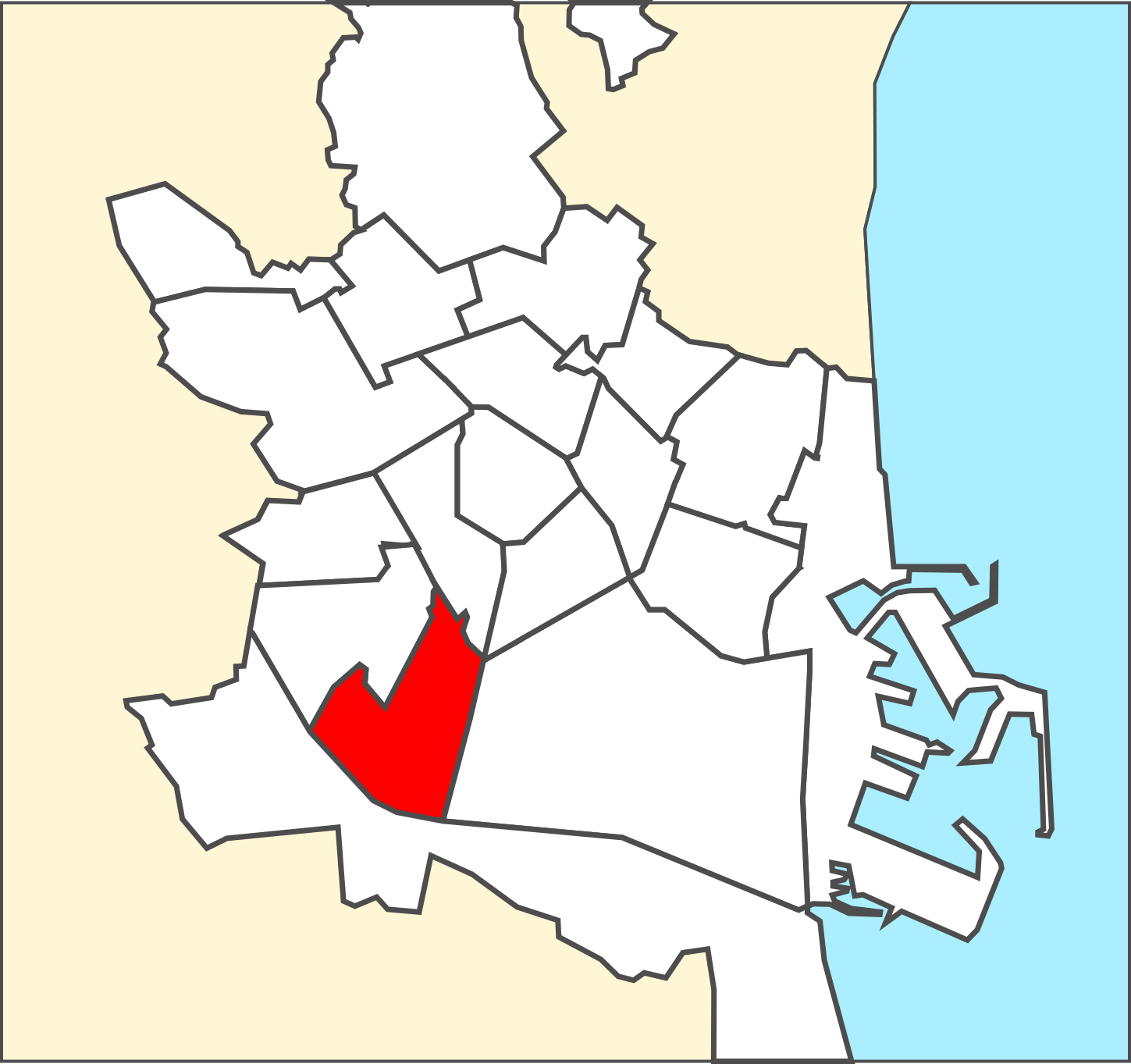 Districte de Jesús.